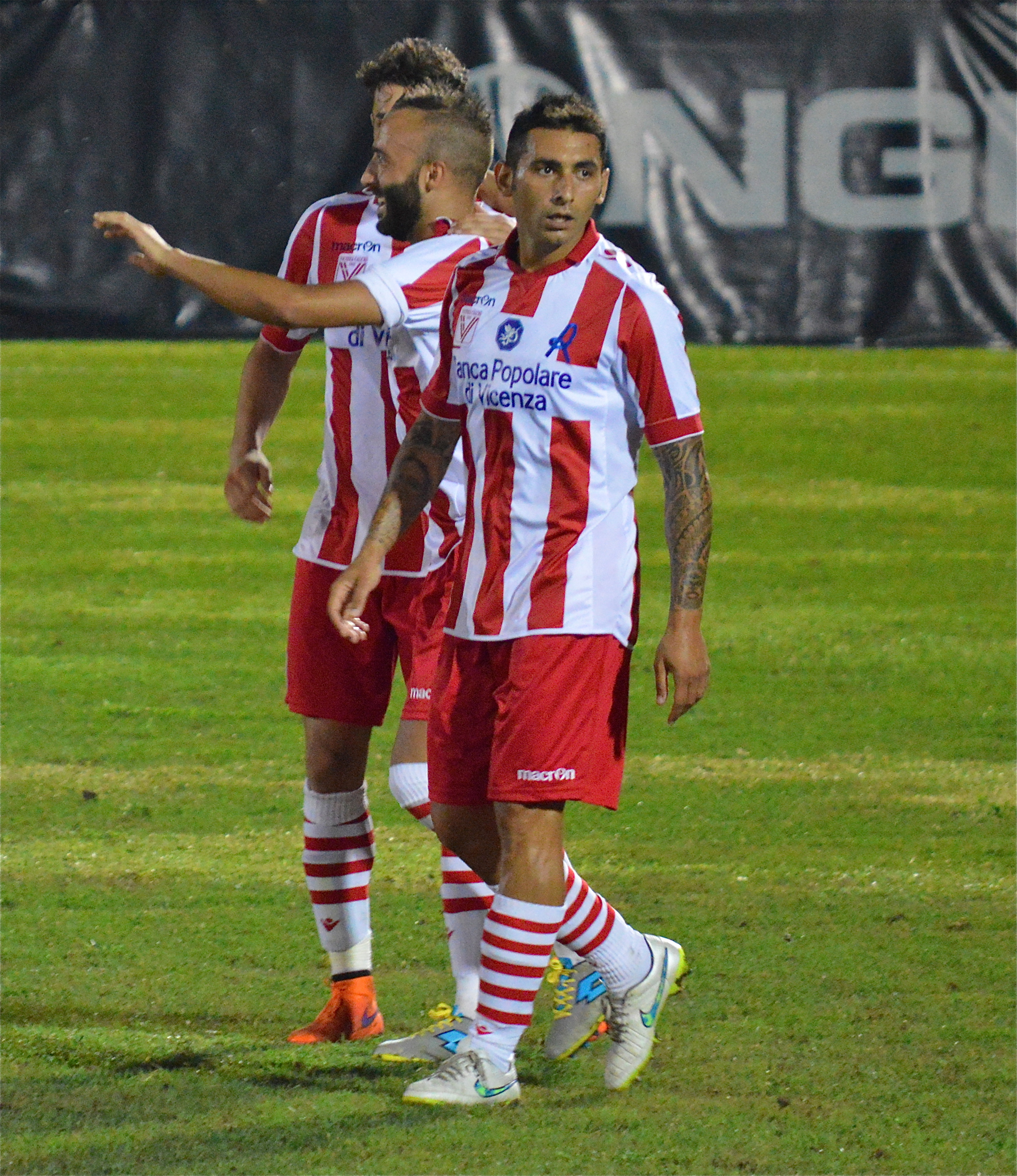 Michele Pazienza durante Vicenza - Chievo 2-1